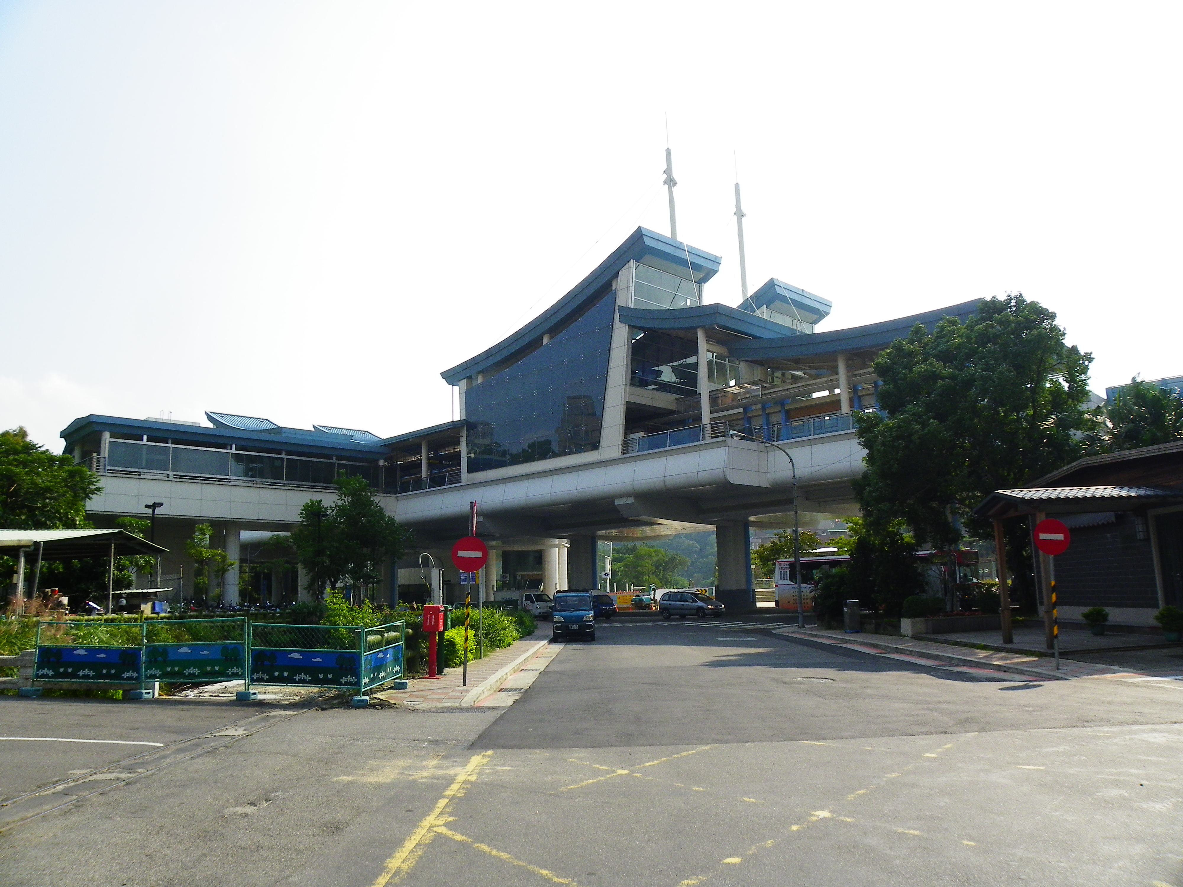 台北捷運内湖線大湖公園駅。